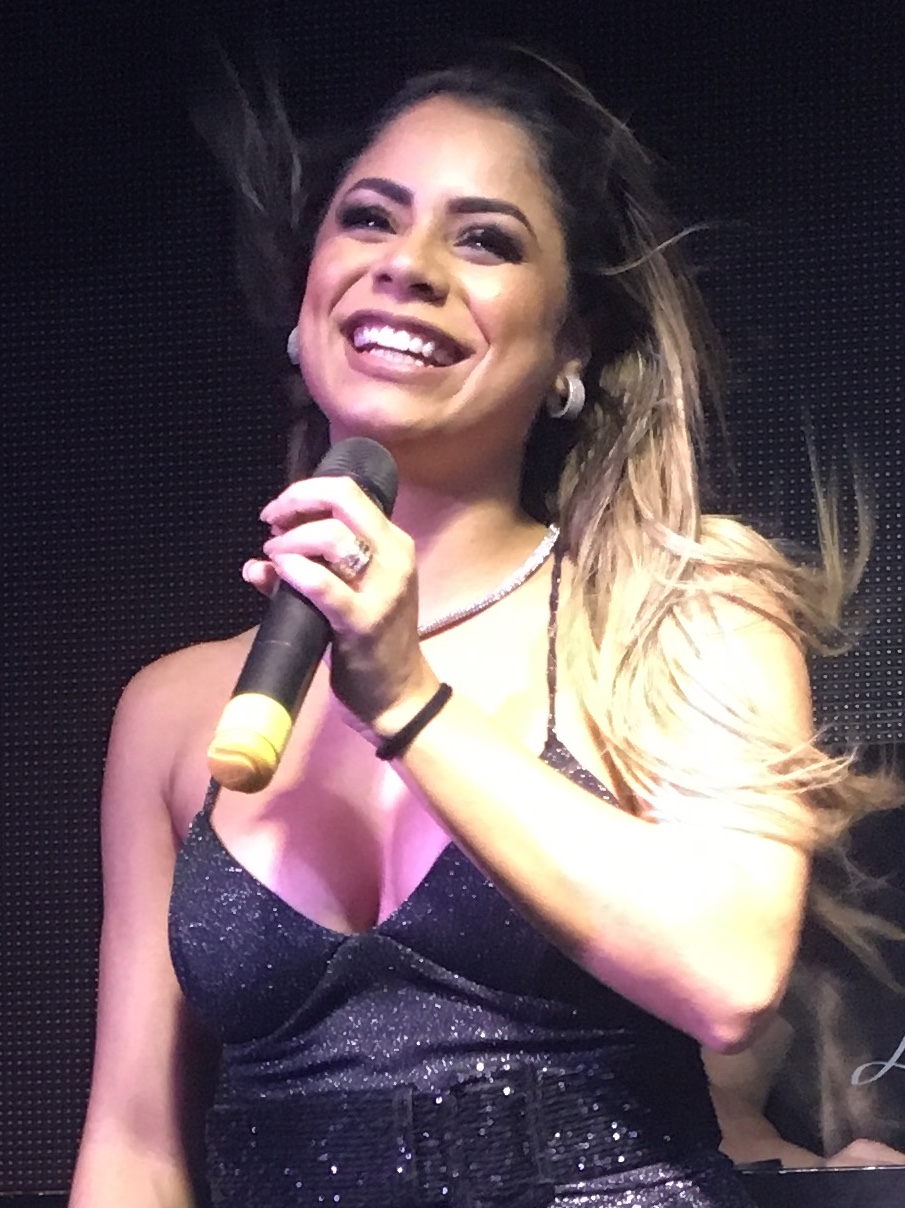 Lexa se apresentando em Santa Maria em 2019